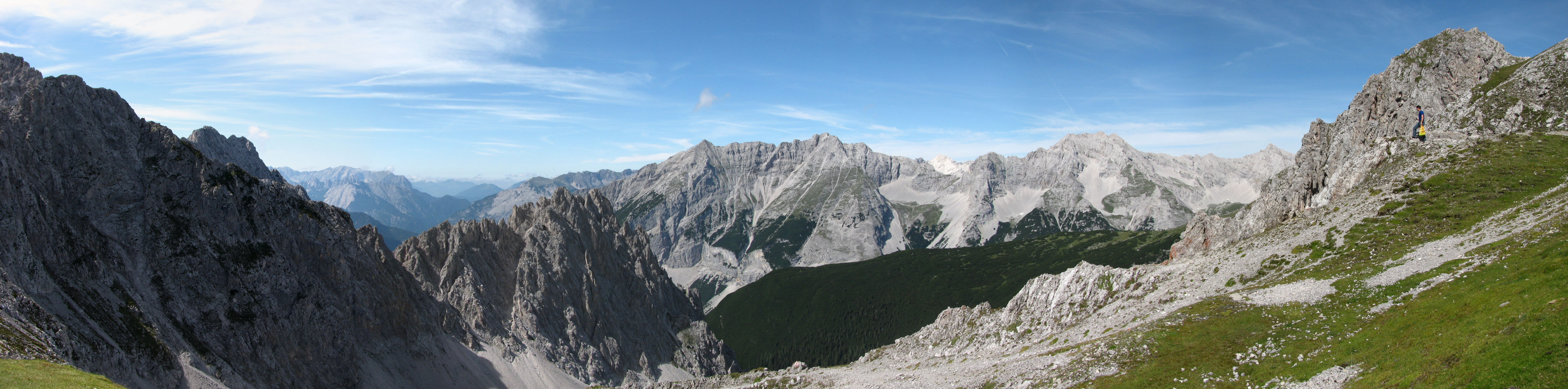 Panorama-Ansicht vom Hafelekar bei Innsbruck in Richtung Norden